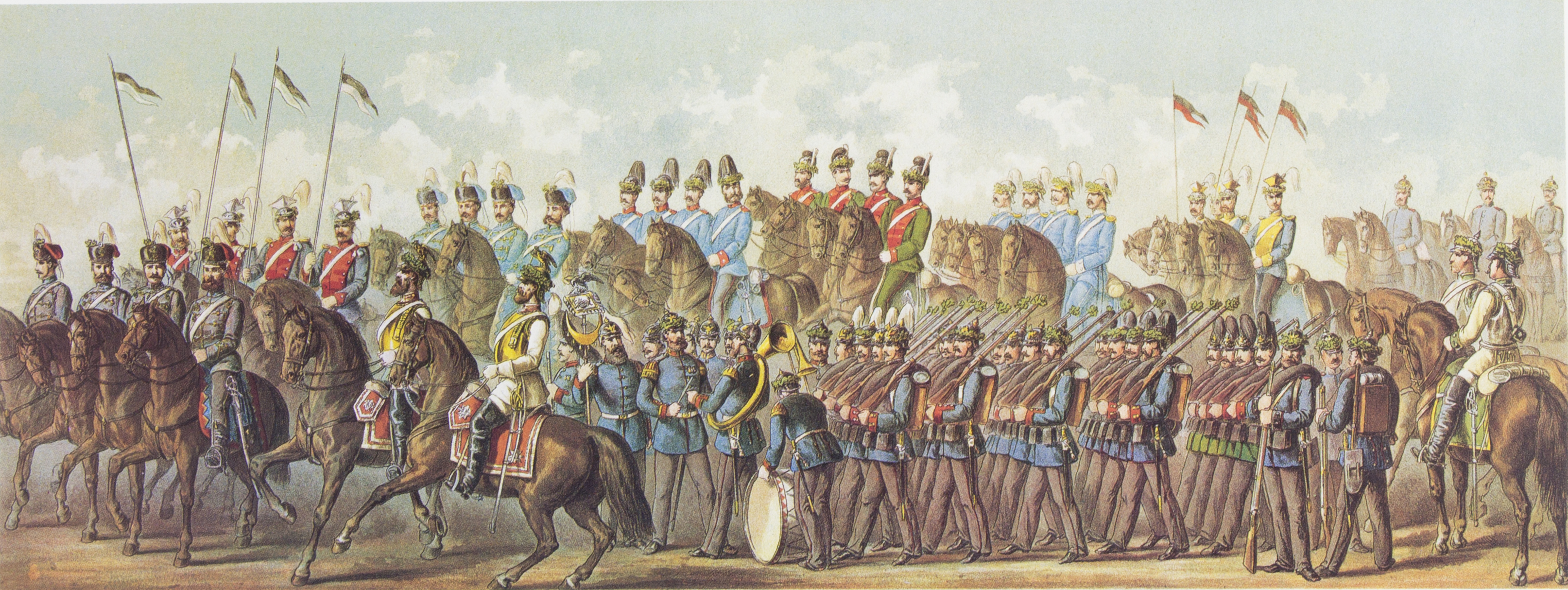 Tony Avenarius: Historischer Festzug veranstaltet bei der Feier der Vollendung des Kölner Doms am 18. October 1880. Tafel XXIX